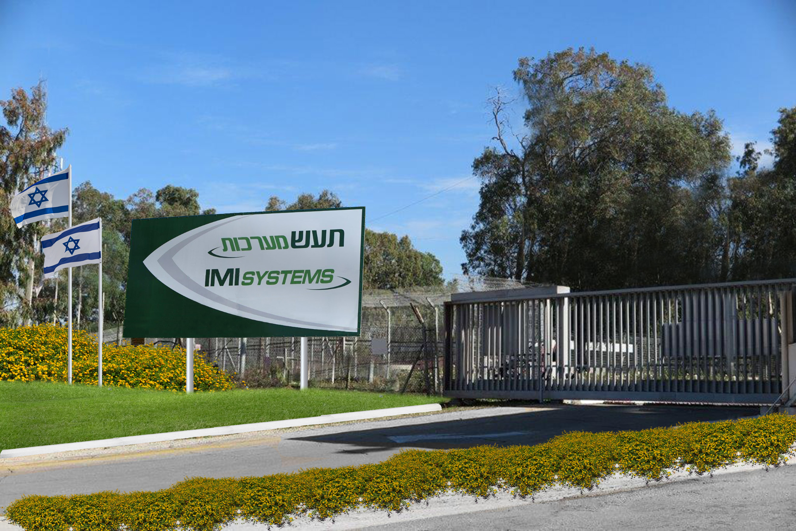 תעש מערכות לוגו חדש